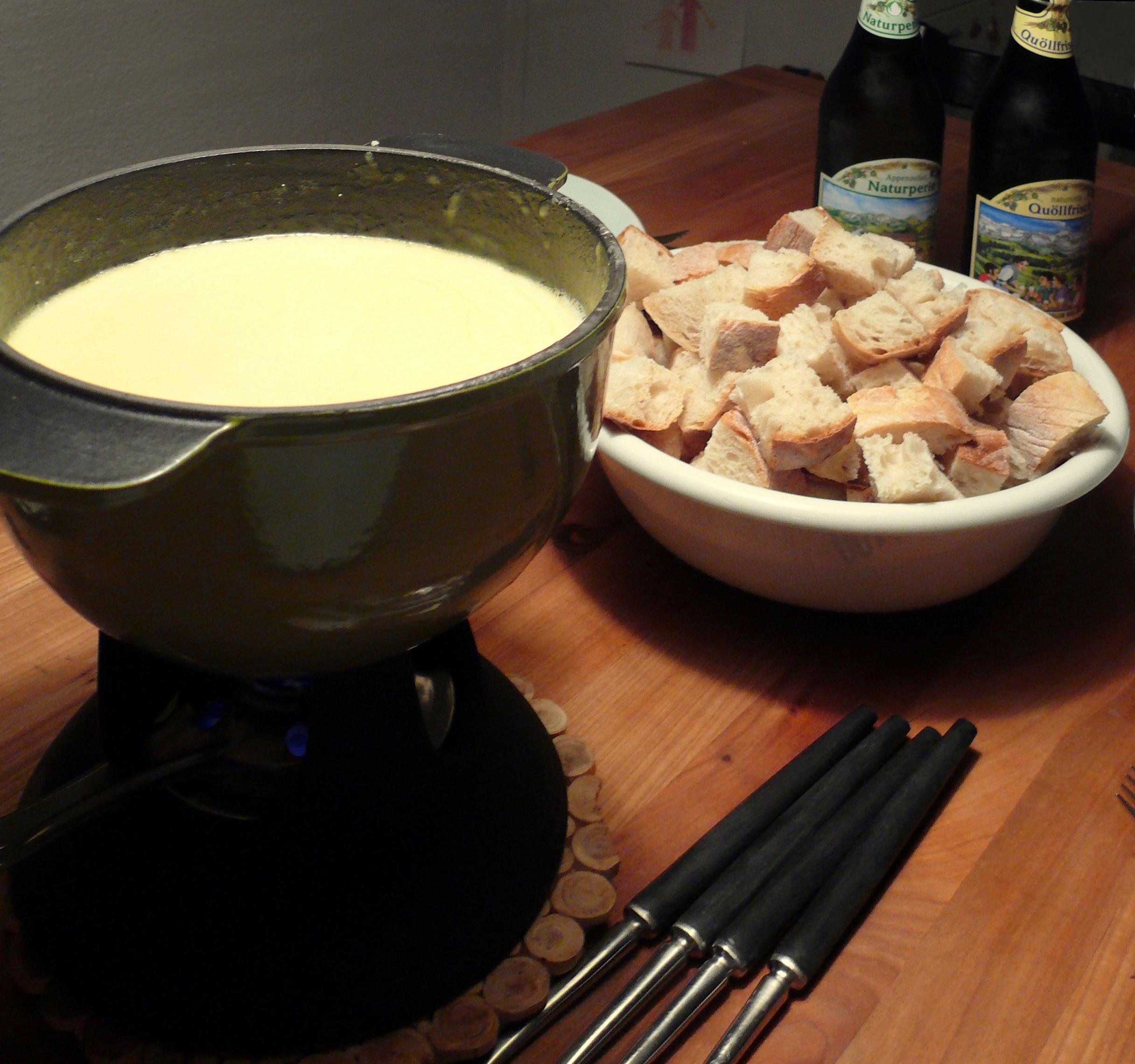 Schweizer Käsefondue mit Brotstückchen. Hier Zubereitung des Käsefondues in einer Fonduepfanne aus Keramik (Caquelon) auf einem Rechaud, sowie mit speziellen Fonduegabeln.